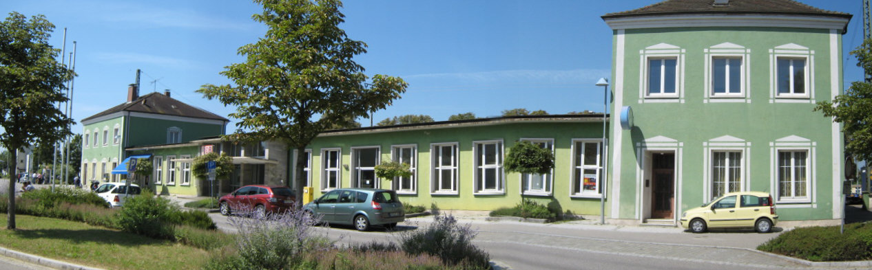 Panoramaansicht des Bahnhofs Müllheim (Baden), D, Stadtseite, von Osten